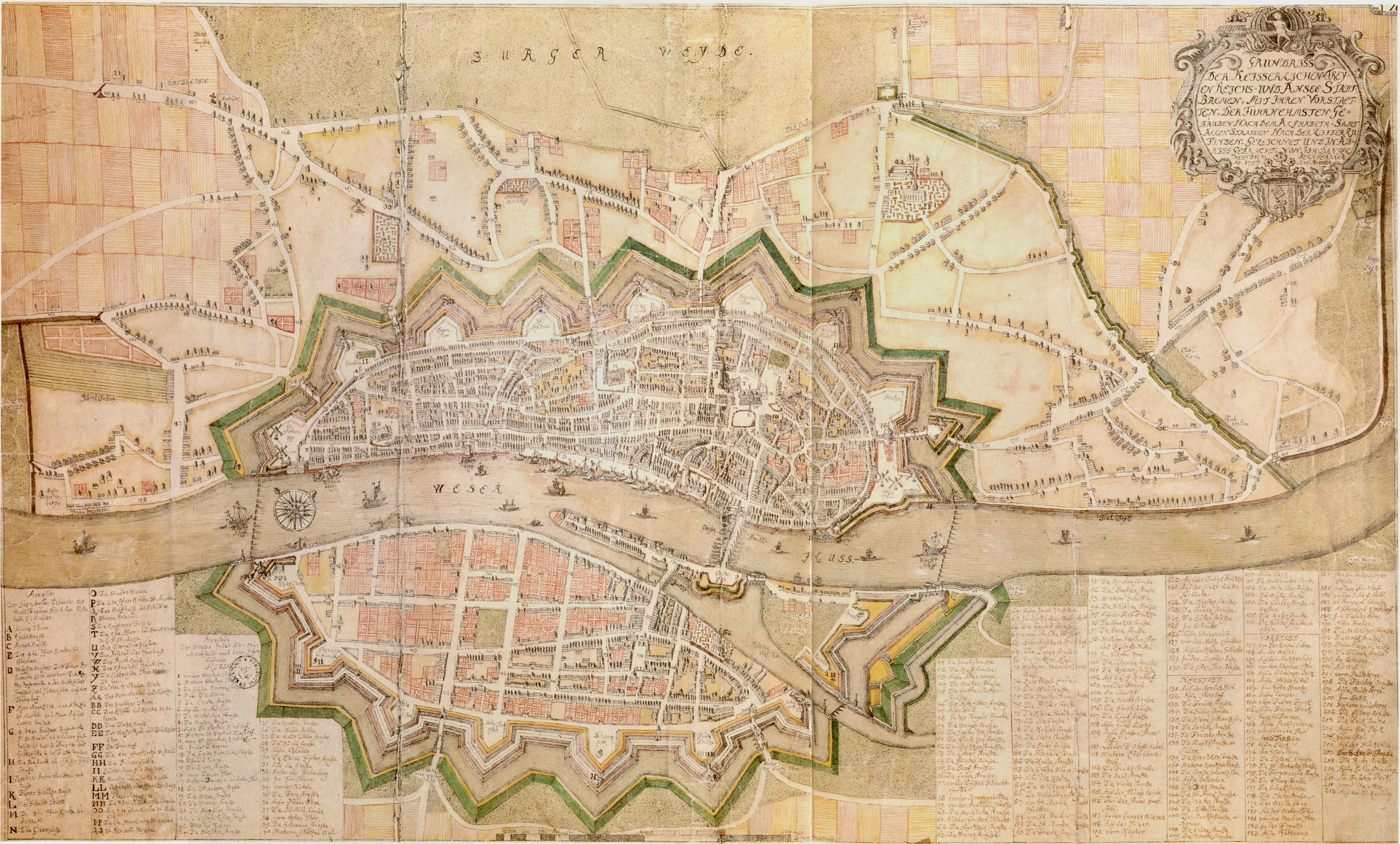 Original title: Grundriee der Keisserlichen=Freyen Reichs=und Ansee Stadt Bremen, Mit Ihren Vorstaedten, Der Fuhrnehmsten Gebäuden Nach dem Alphabeth=Samt Allen Strassen Nach der Ziffer zu Finden. Gezeichnet Und In Abriss gebrach von Joh:Daniel Heeinbach Feurwerkker Ao 1757